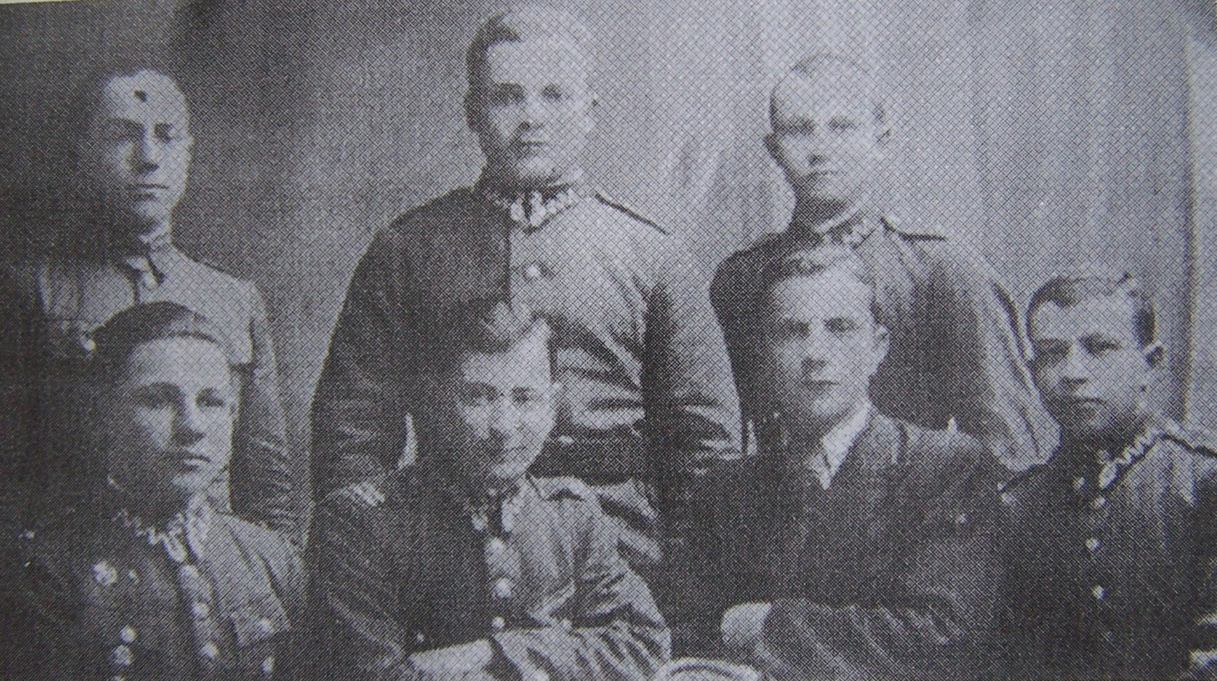 Jan Koch (u góry z prawej), Antoni Żubryd, Jan Kurek, Józef Kot, Władysław Czopor (od lewej u dołu)